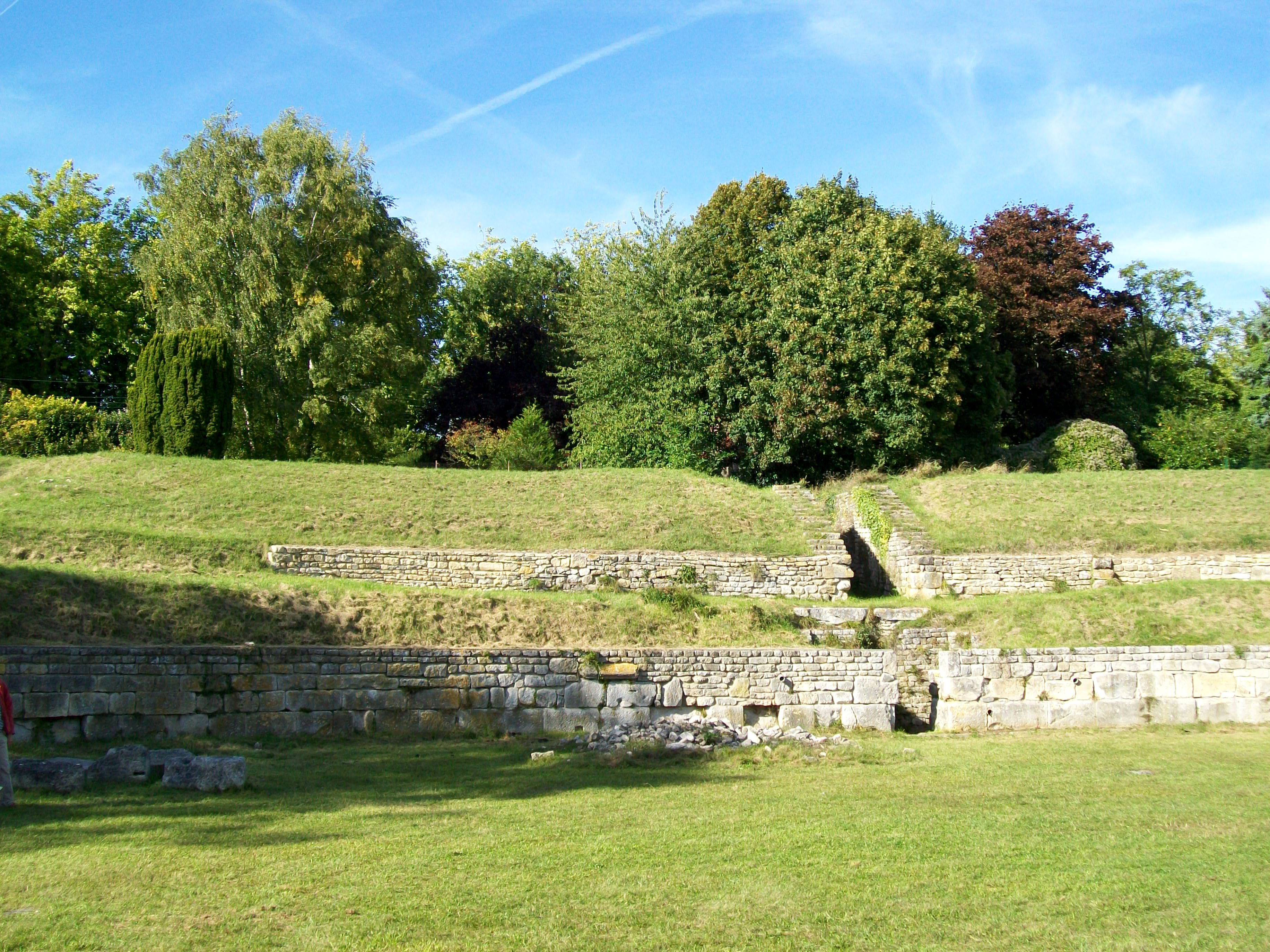 Arènes gallo-romaines du Ier siècle ap. J.-C., situées au bout d'une impasse partant de la place des Arènes, entre l'avenue de Chantilly au nord et la rue de la Fontaine des arènes au sud. Vue sur les gradins nord avec le vomitoire secondaire nord.